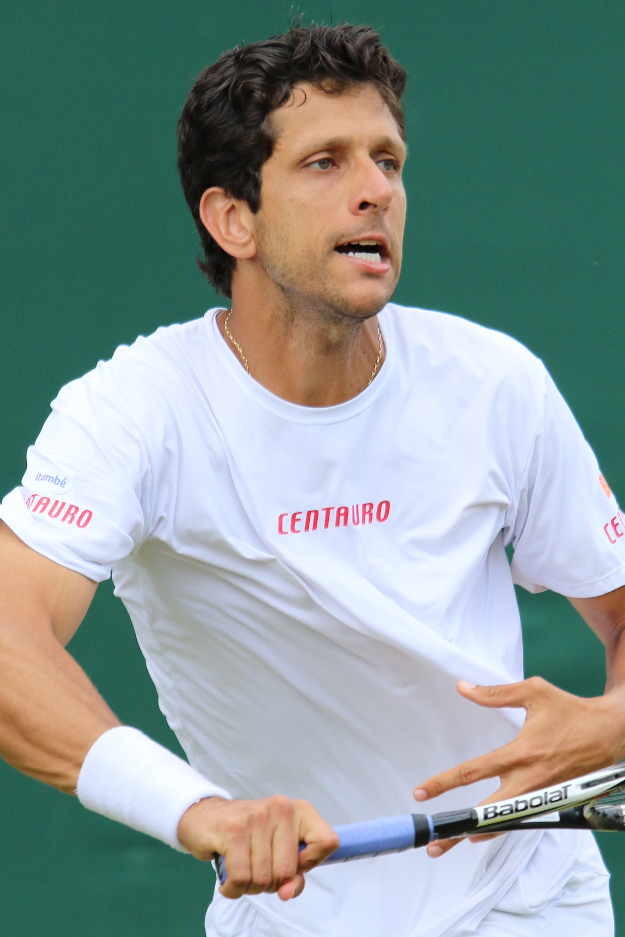 Melo WM17 (3)